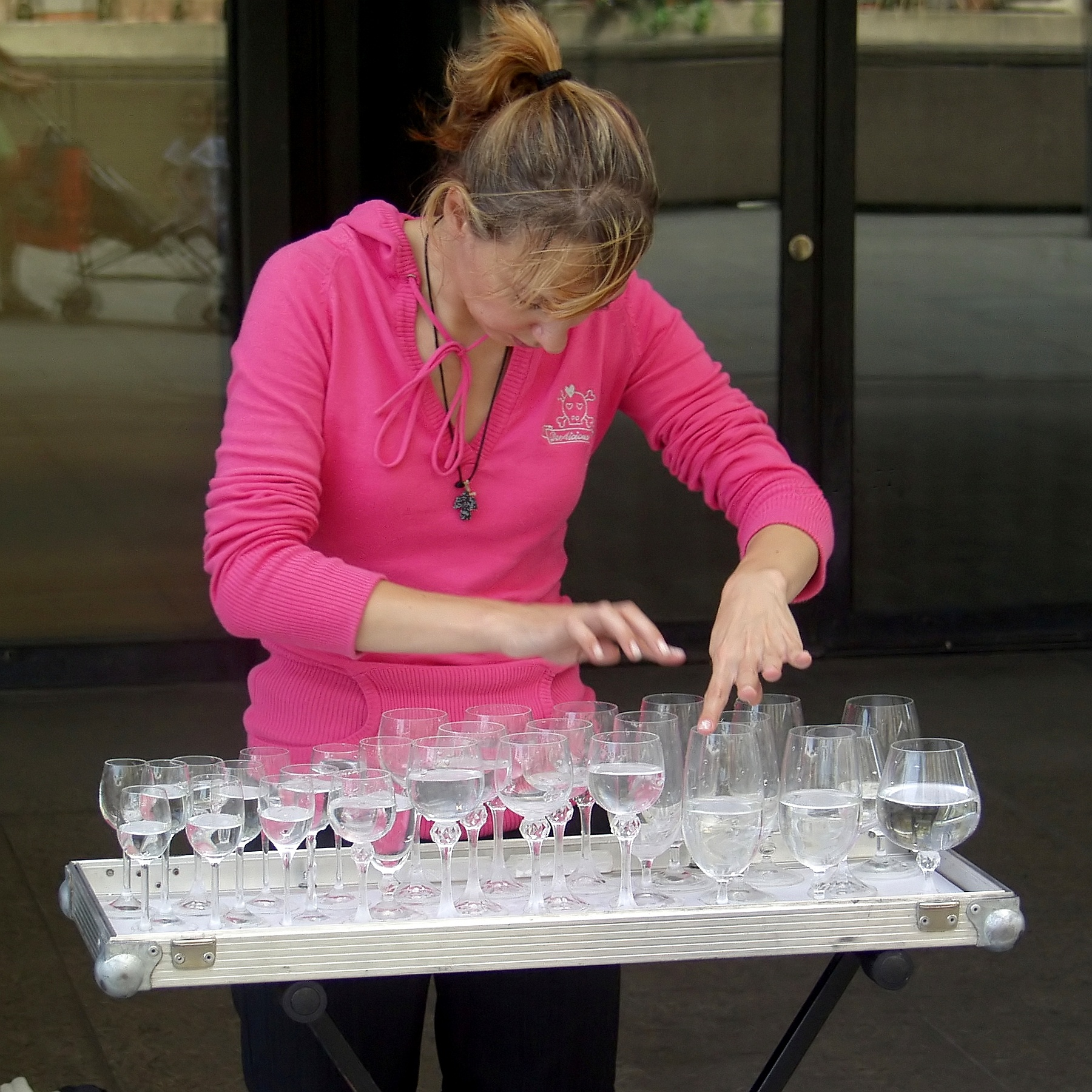 Glasharfenspielerin in Köln